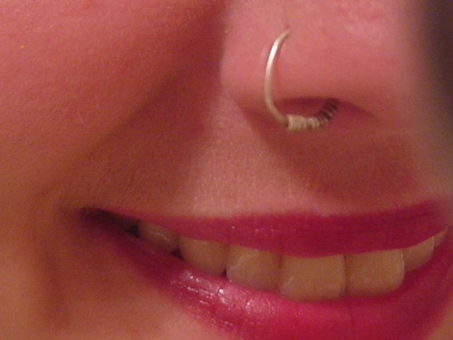 Nose piercing